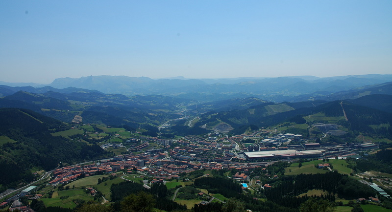 Urretxu eta Zumarraga, Irimotik (Gipuzkoa).